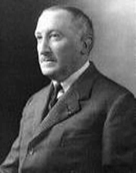 Fotografie mit Paul Moreau-Vauthier (1871-1936)